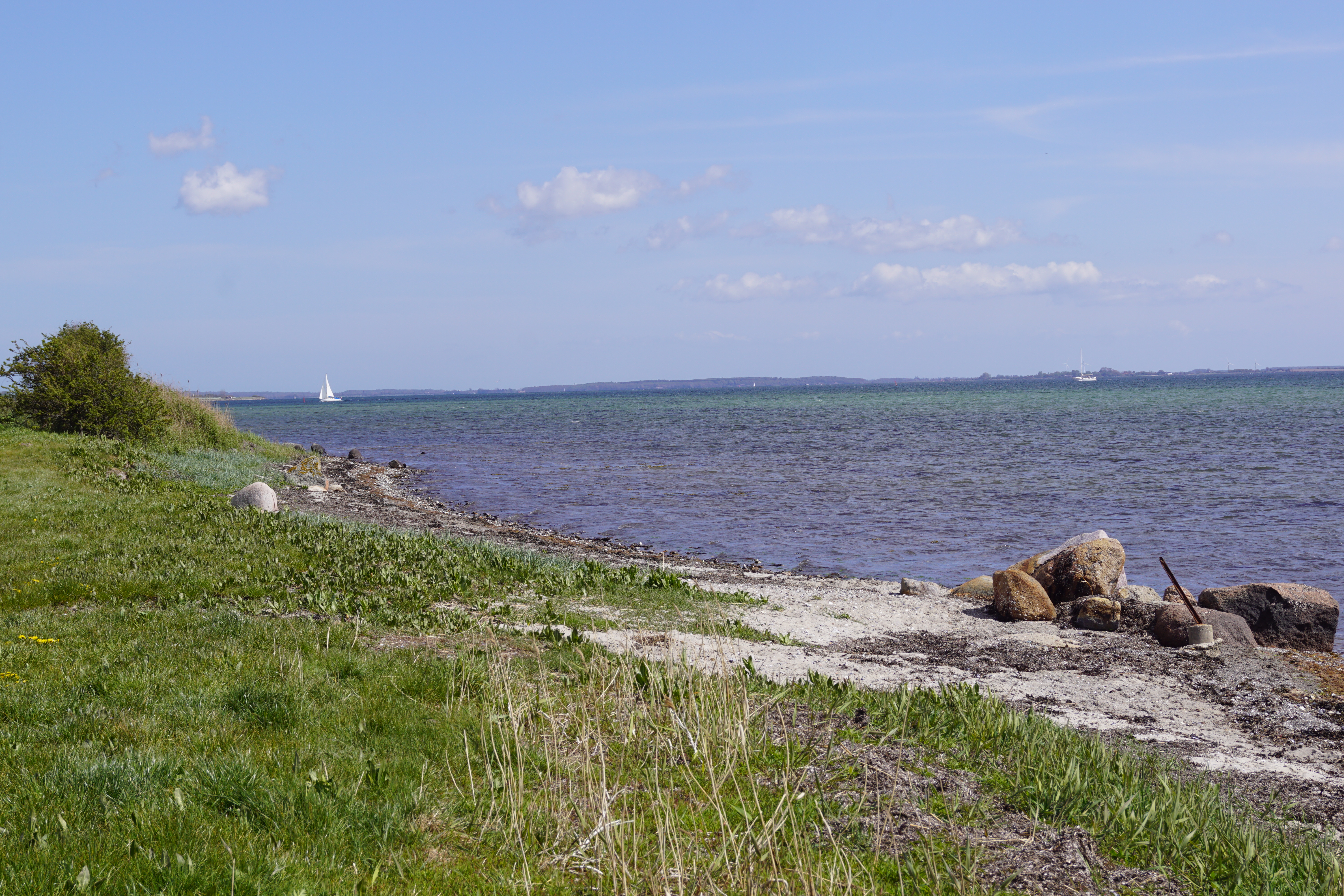 Nakkebølle Fjord set mod mod øst